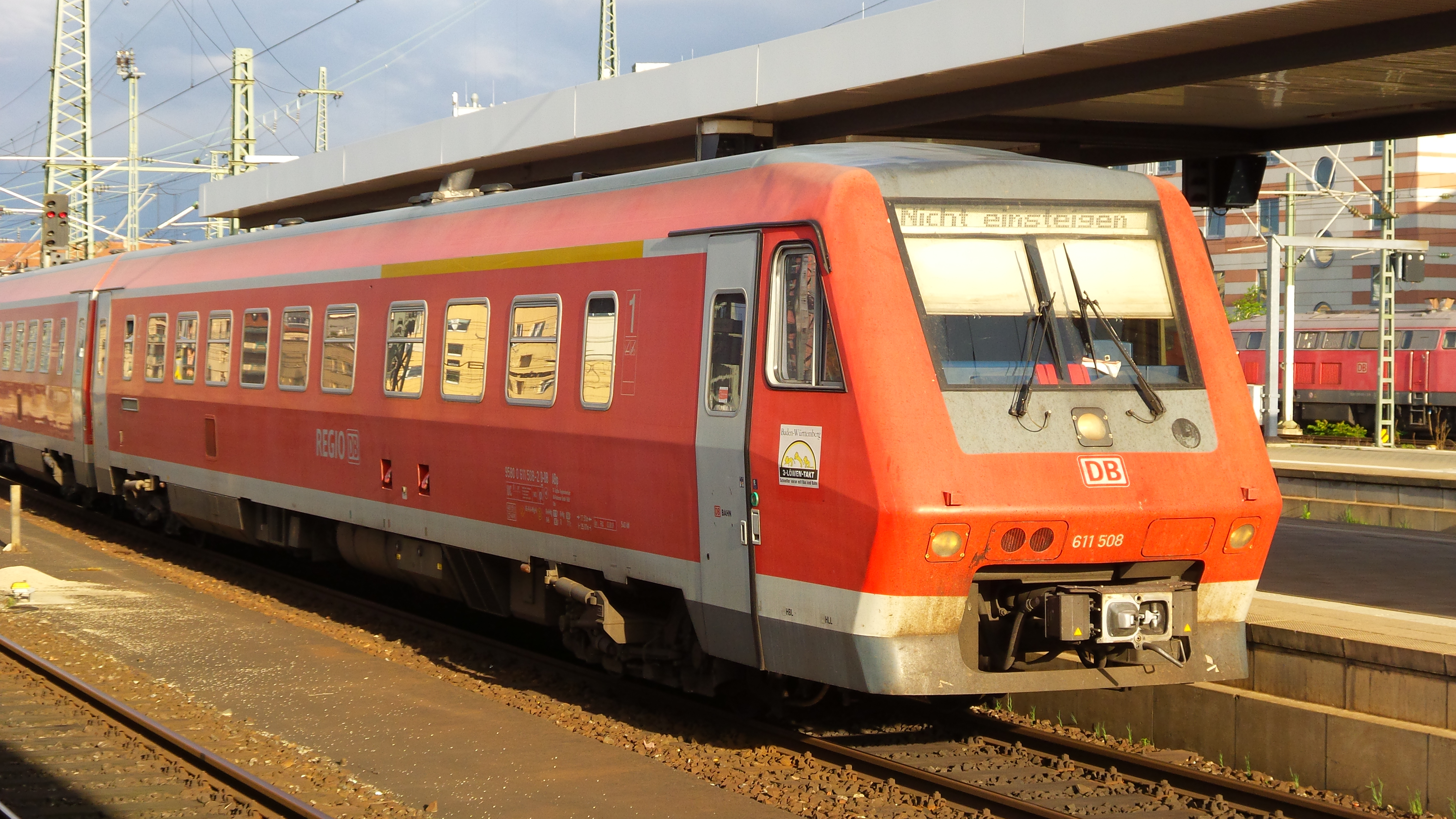 DB Dieseltriebwagen 611 508 in Nürnberg Hbf